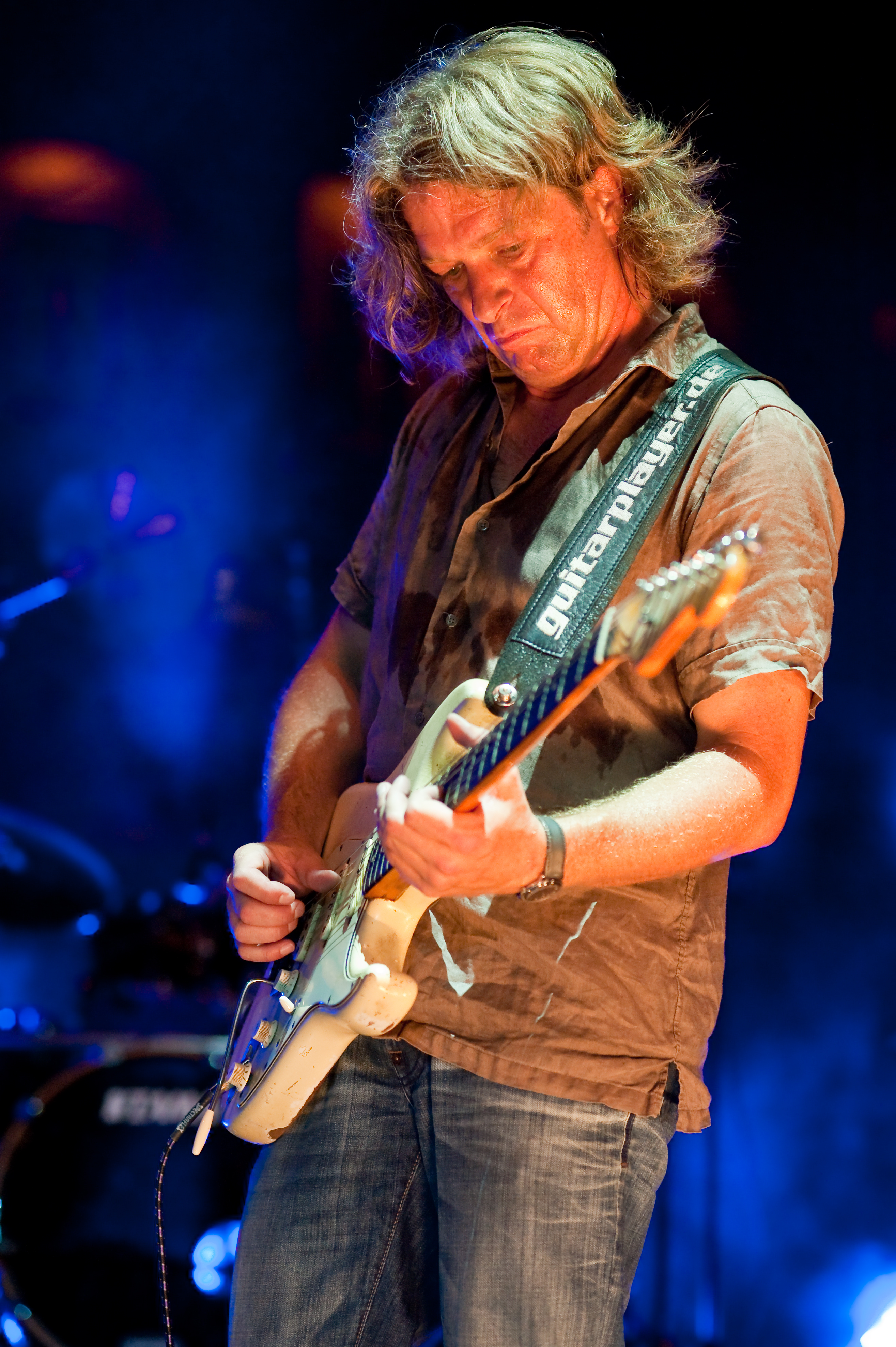 Thomas Blug bei einem Auftritt am Saarbrücker Stadtfest 2009 vor dem Staatstheater.